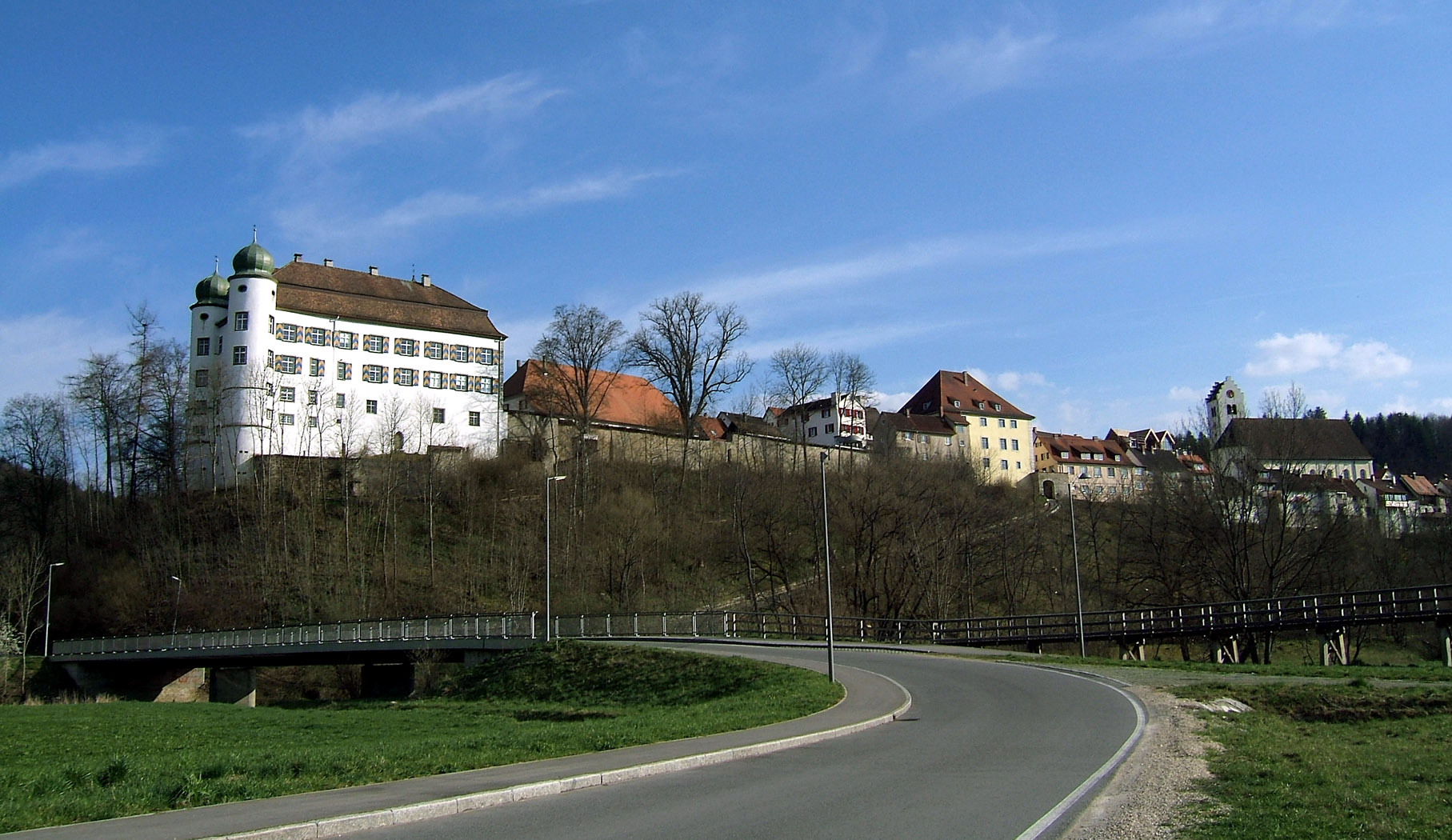 Blick auf Mühlheim an der Donau; links Schloss Mühlheim, in der Mitte das Vordere Schloss, rechts die Pfarrkirche St. Magdalena.